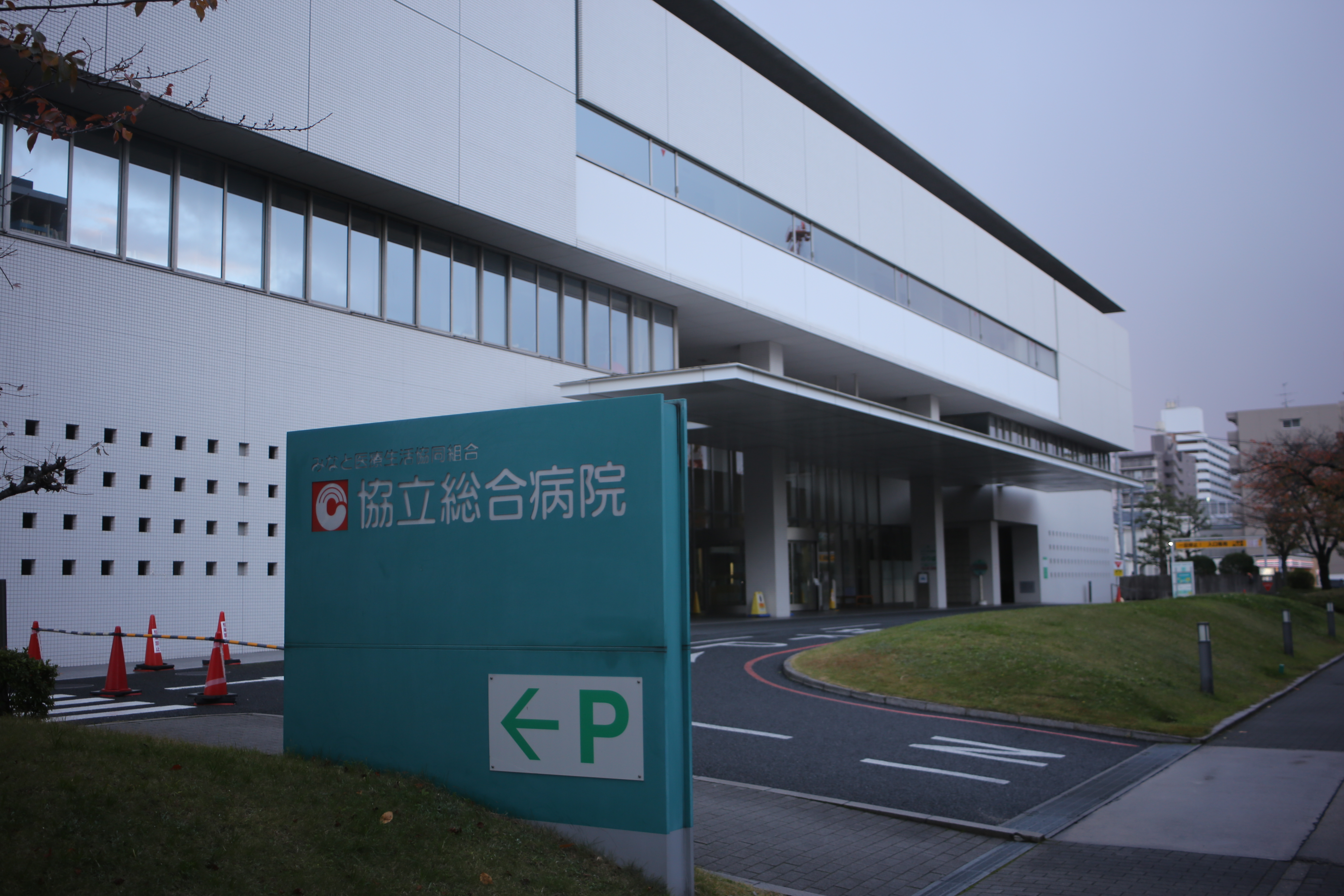 名古屋市熱田区五番町の協立総合病院